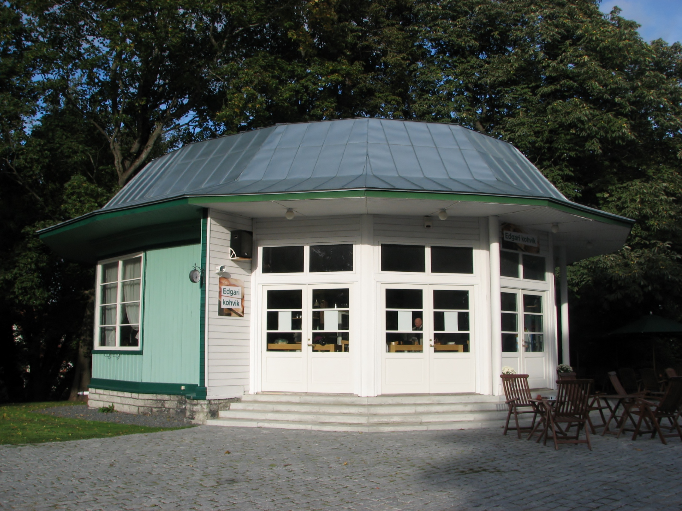 Harjumäe kõlakoda 2013. aasta KOV valimiste eel Edgari kohviku silte kandmas